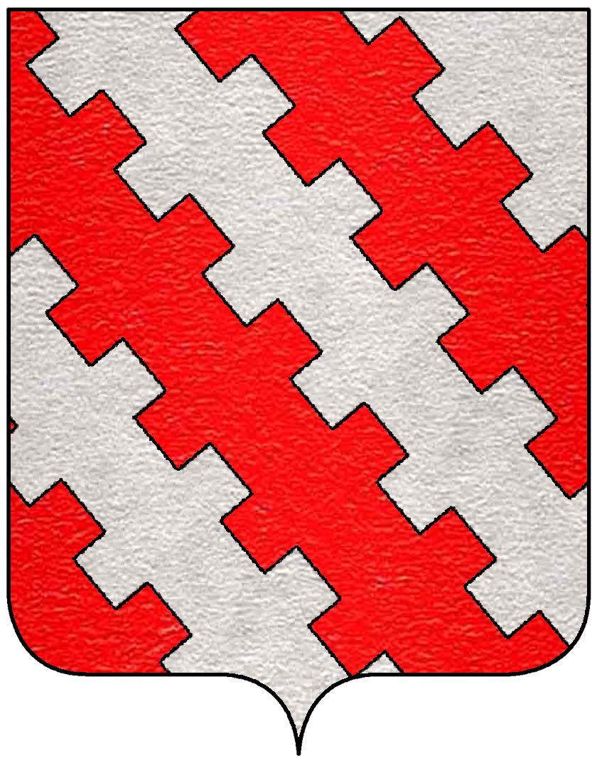 Stemma della famiglia Salviati